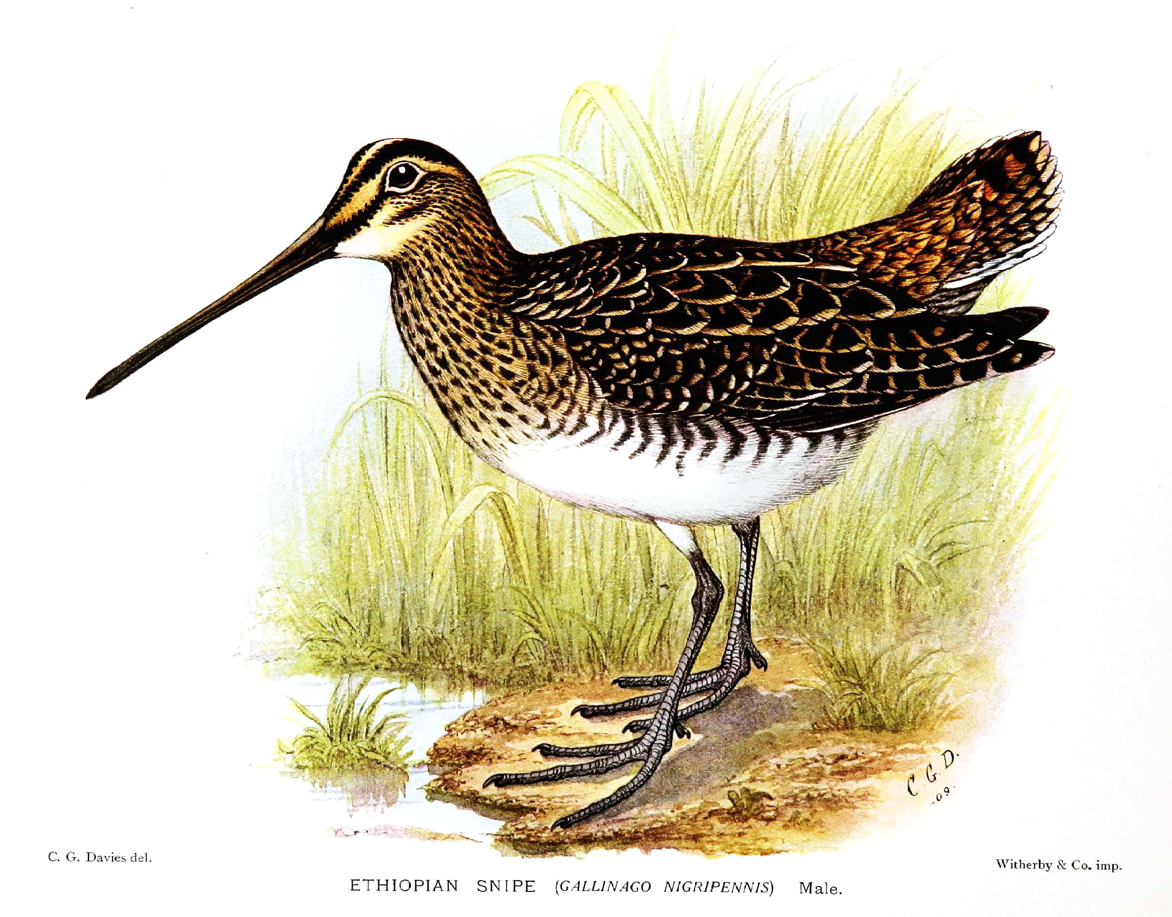 Gallinago nigripennis